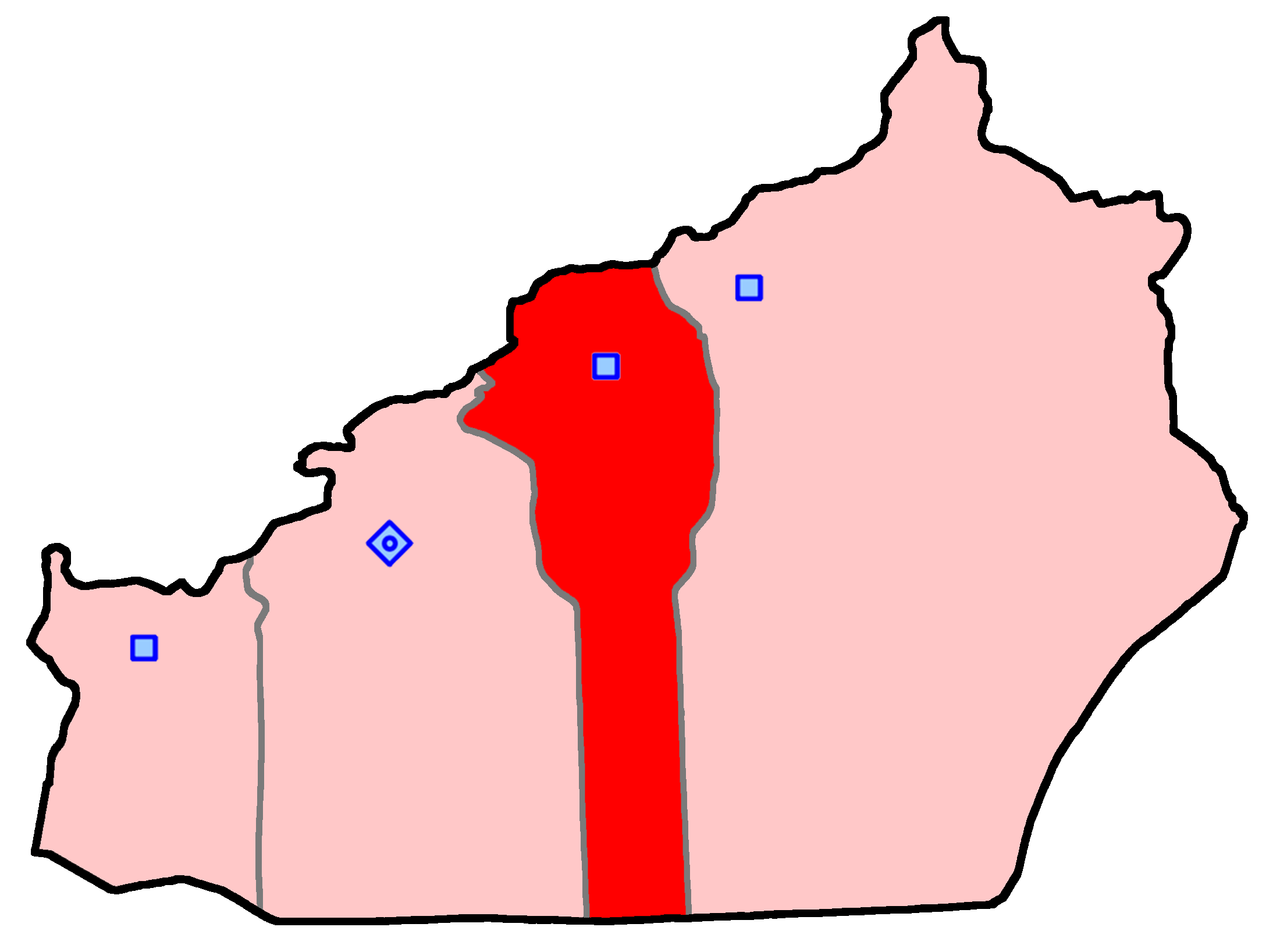 =حوزهٔ انتخاباتی دامغان برای انتخابات مجلس شورای اسلامی